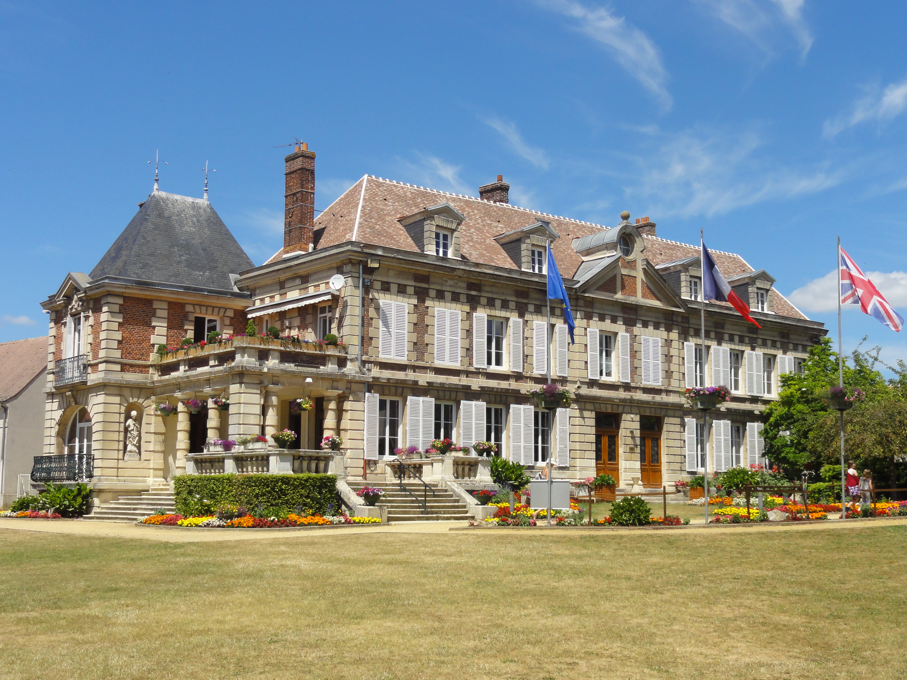 La mairie, 2 rue de l'Aigle, vue depuis l'est.